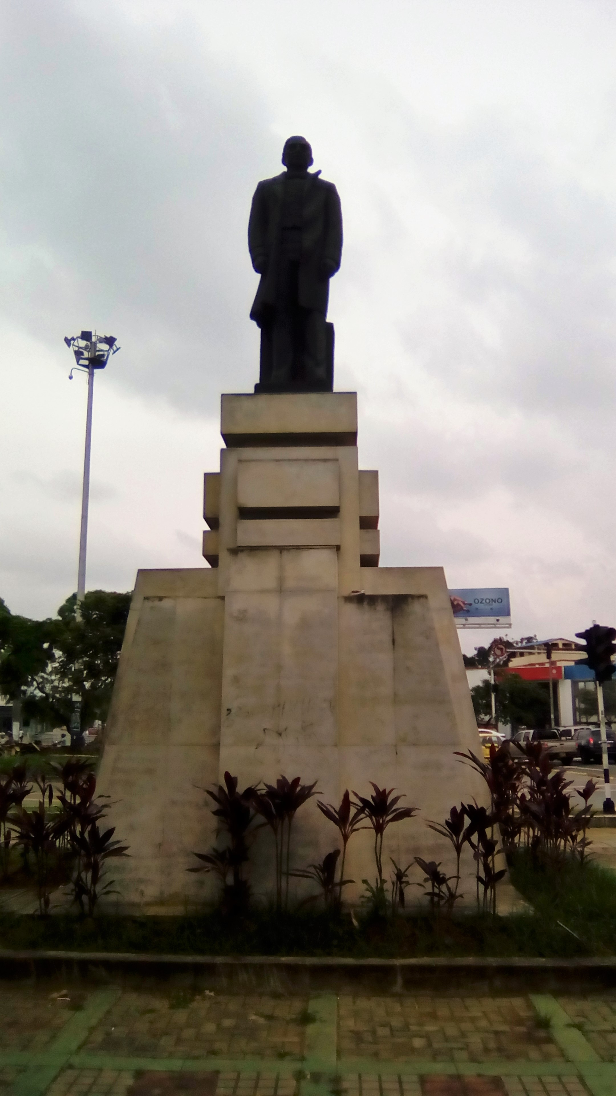 Monumento a Benito Juárez en Santiago de Cali